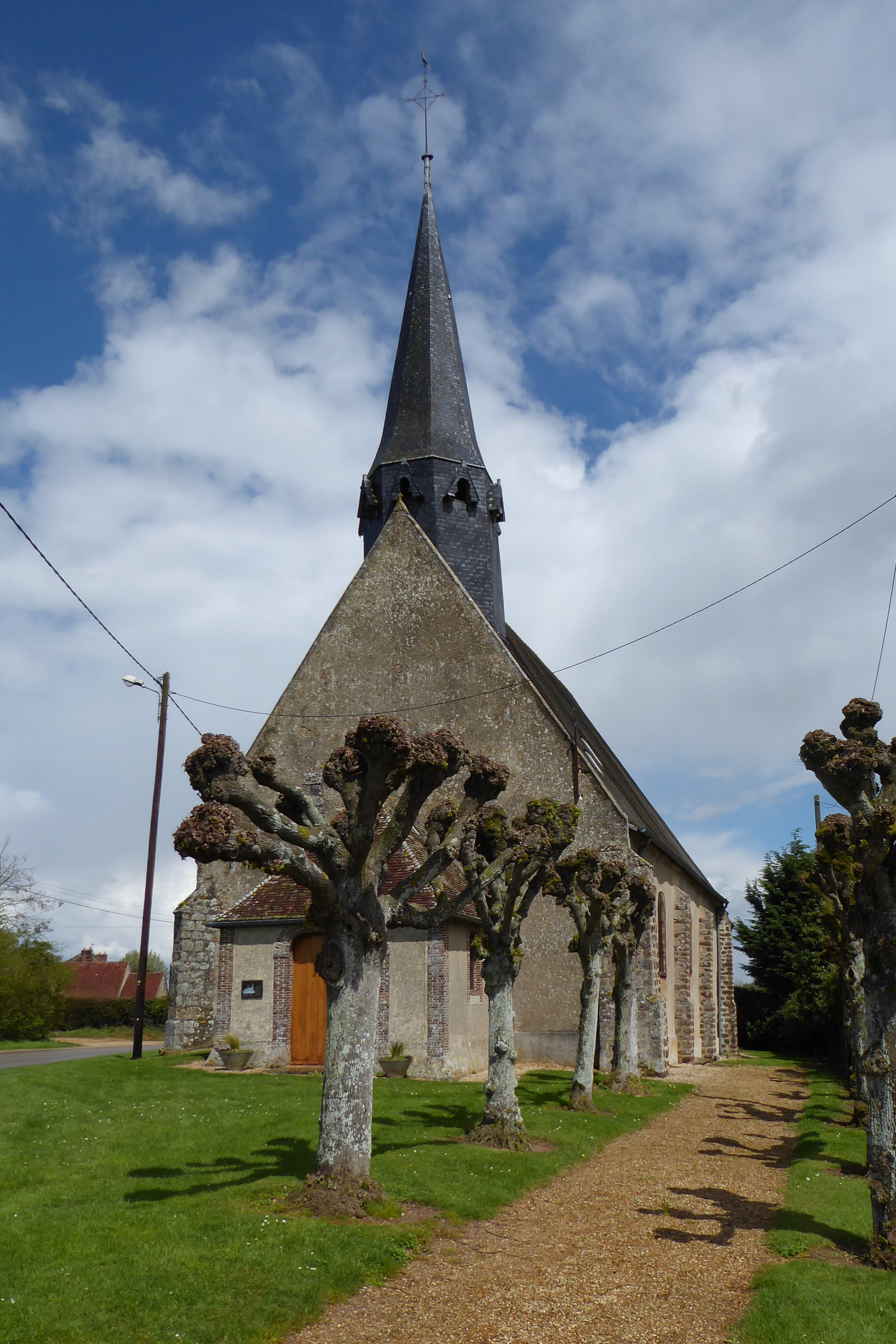 église Saint-Denis, Rueil-la-Gadelière, Eure-et-Loir, France.